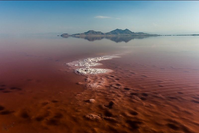 سرخی دریاچه ارومیه - تغییراتی مانند قرمز رنگ شدن دریاچه ارومیه در دریاچه های شور جهانی نظیر گریت سالت لیک آمریکا و دریاچه یوتا و بحرالمیت در اردن نیز دیده شده است.کارشناسان دلیل اصلی این تغییر رنگ را افزایش فعالیت آرتمیا و رشد جلبک در دریاچه ارومیه اعلام کرده اند. با کاهش دمای آب، شروع وزش بادهای منطقه ای و کاهش شدت و زمان نور خورشید و افزایش آب های ورودی ، این وضعیت به تدریج از بین خواهد رفت.